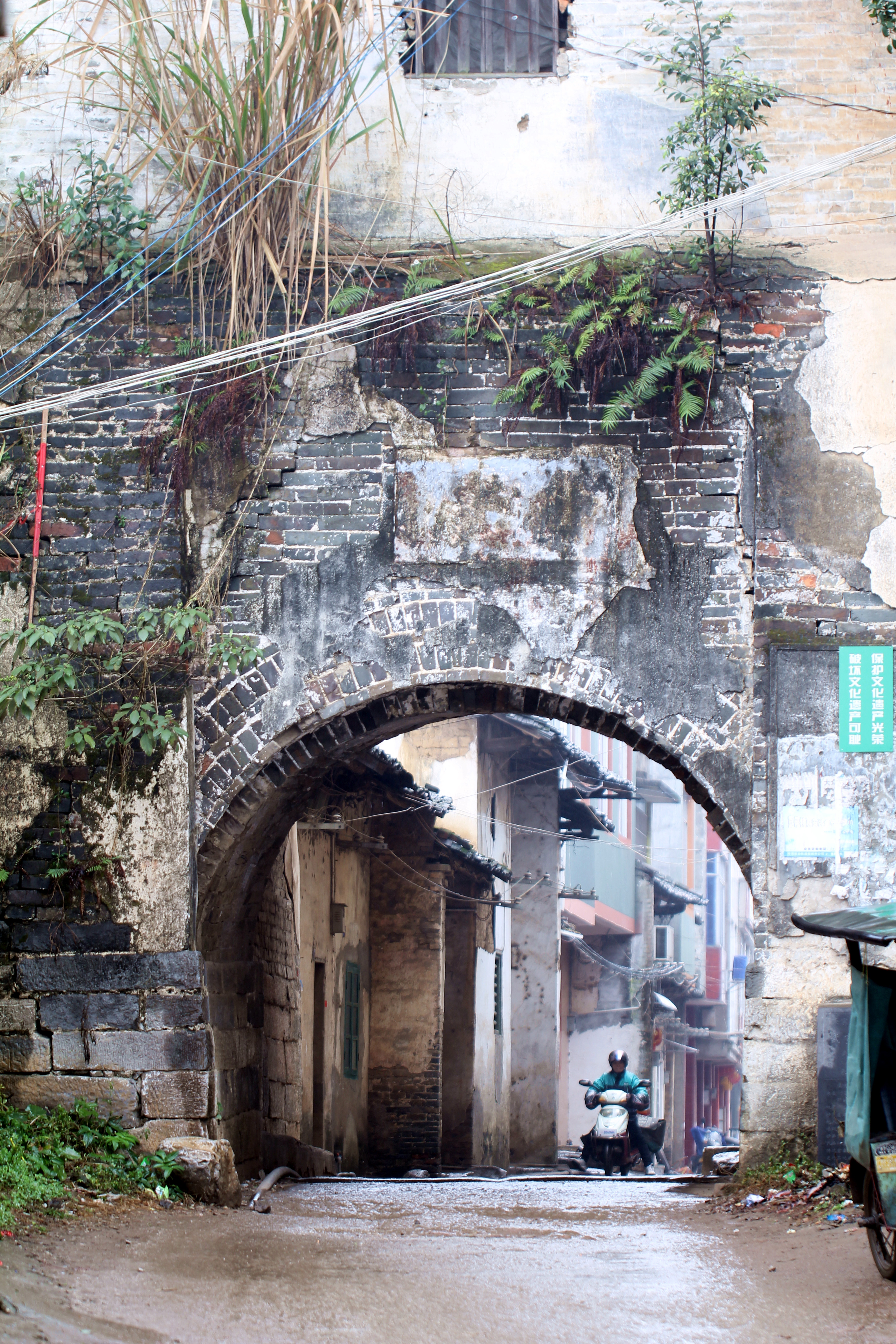 中国广西柳州市武宣县北门